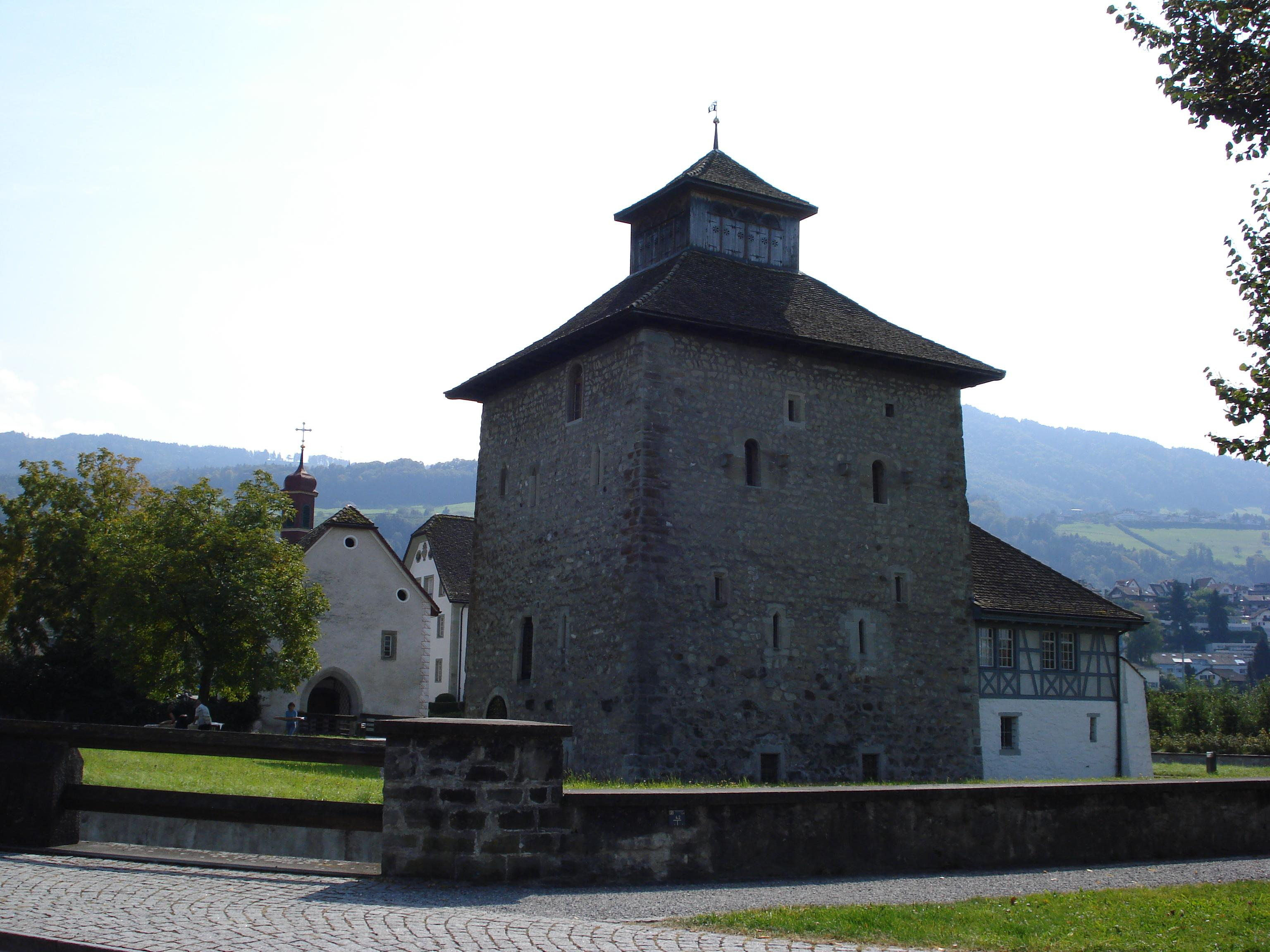 Schlossanlage Pfäffikon